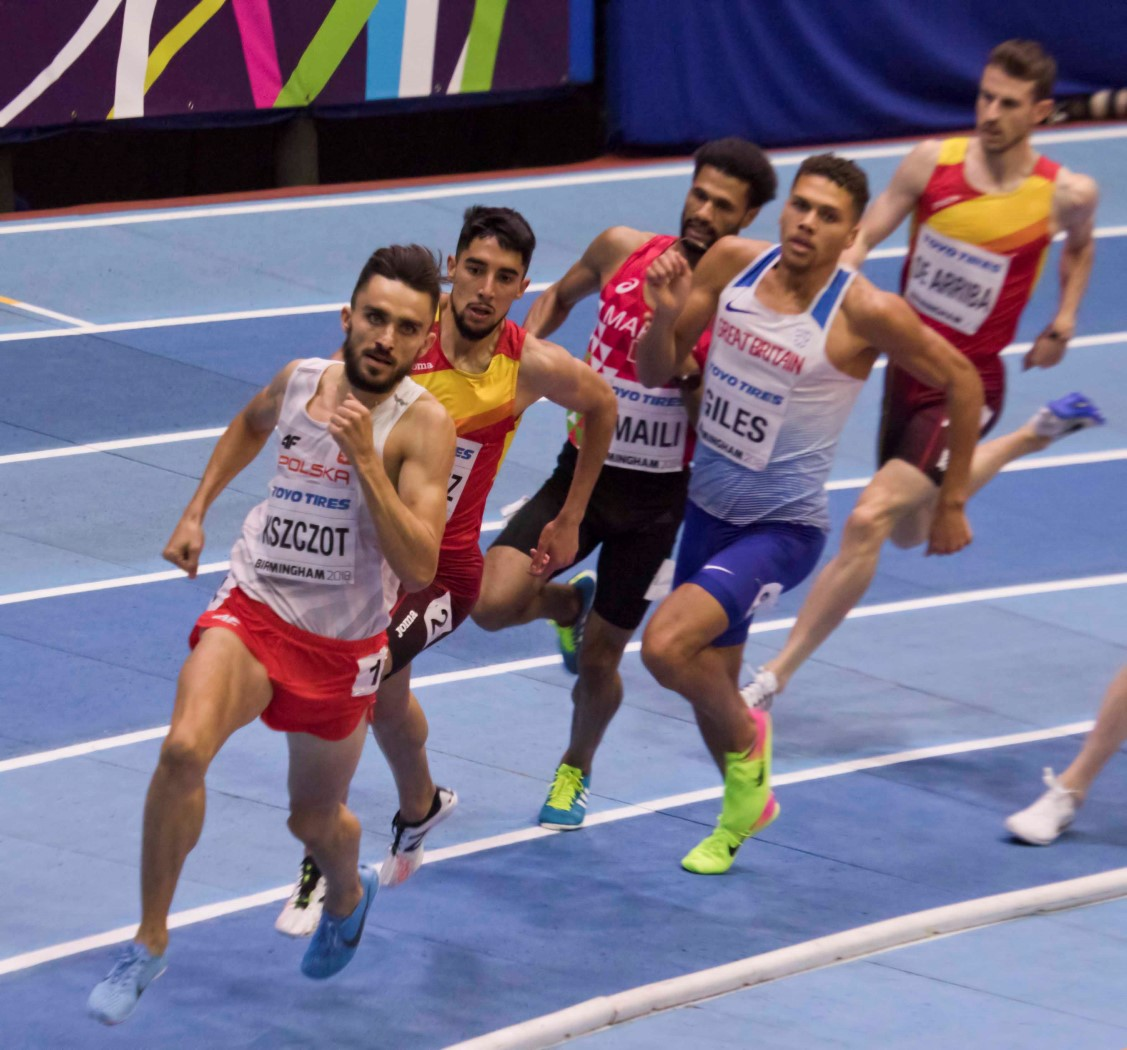 WK3B0139 800m finale man